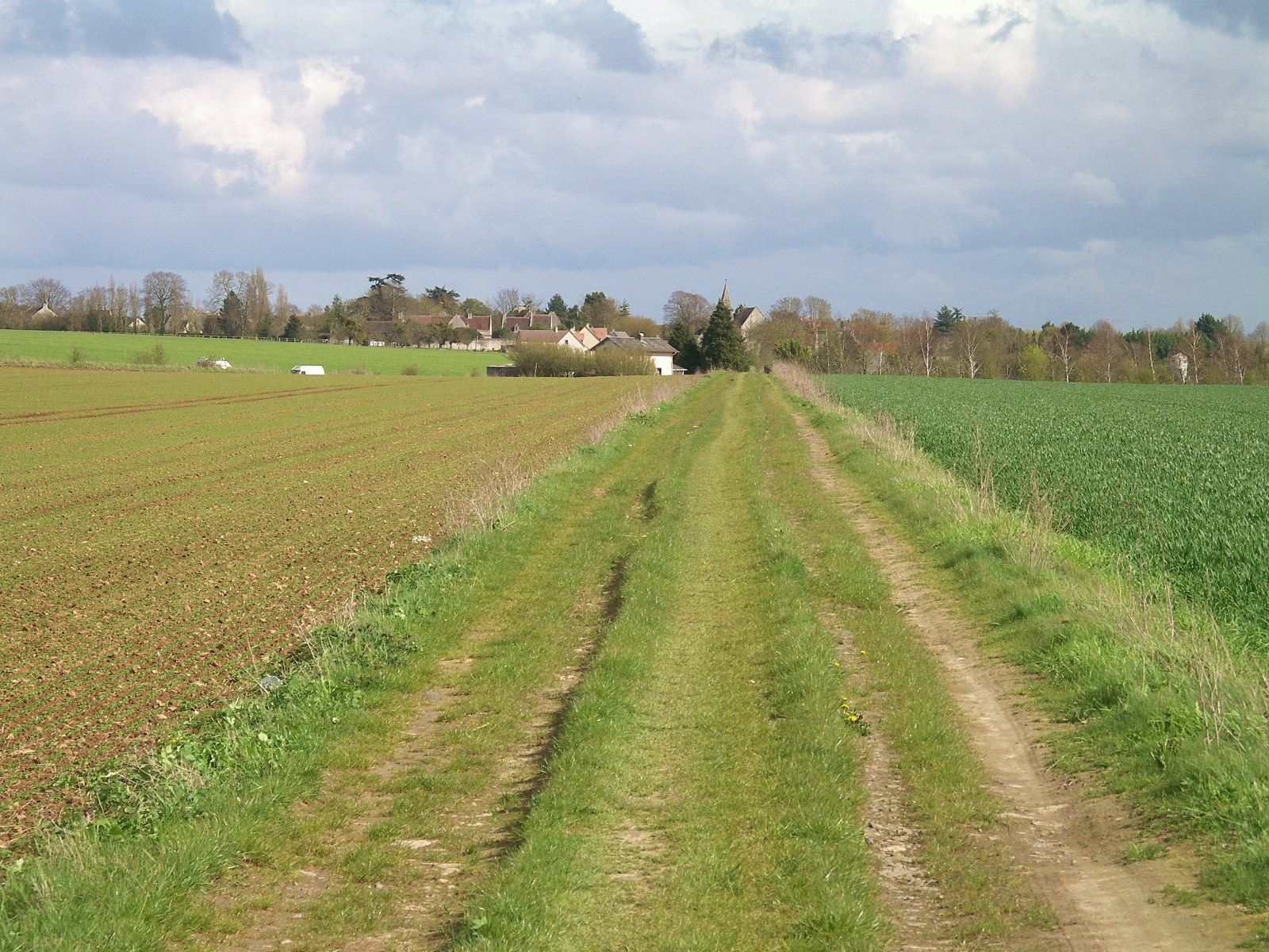 Chemin du Duc Guillaume, dit Chemin Haussé à Bretteville-sur-Laize (Calvados) ancienne voie romaine. Vue du village de Cintheaux